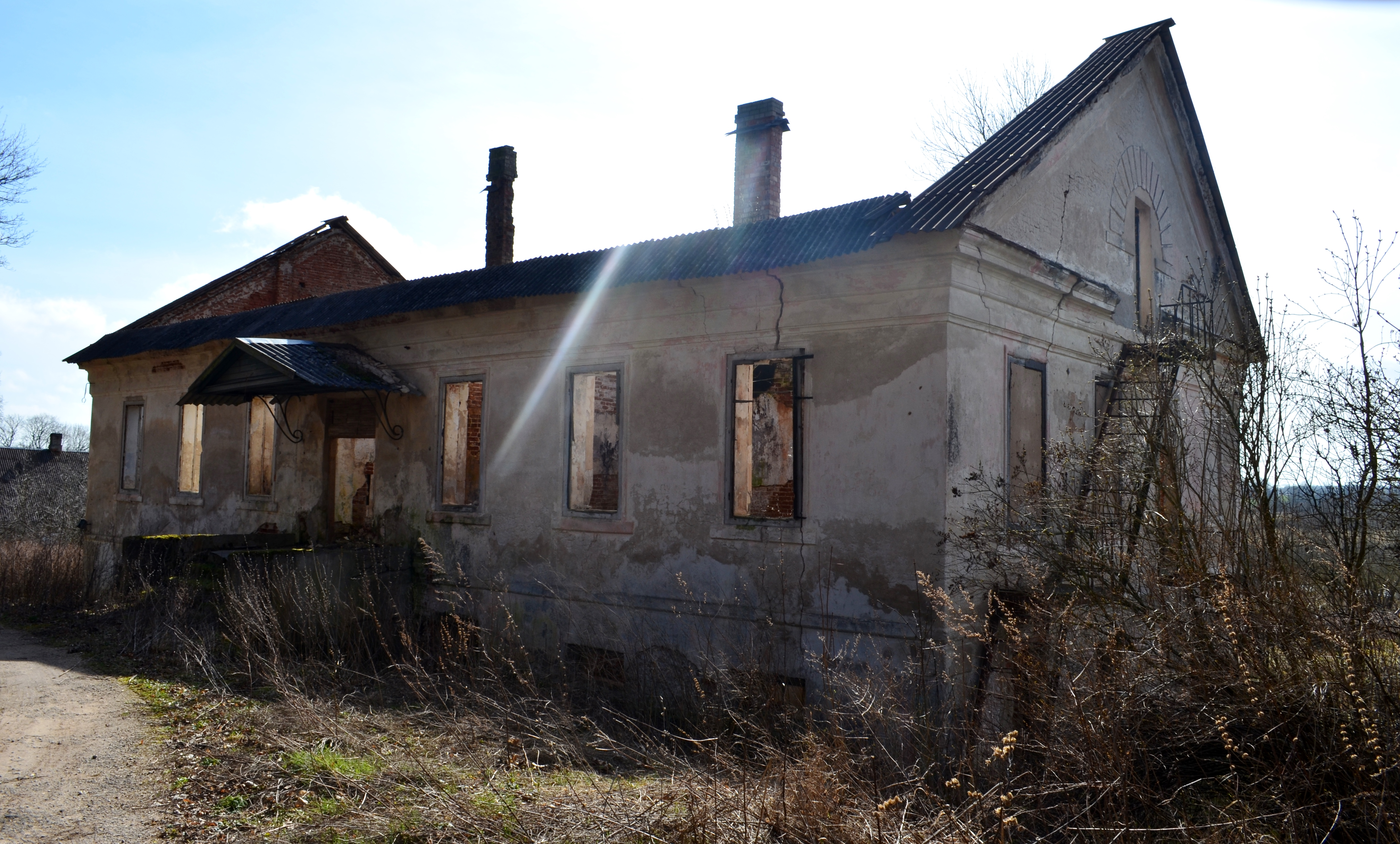 Svirnų I dvaras, Anykščių raj.